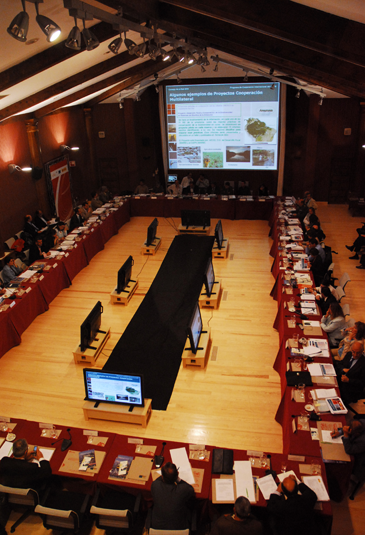 Salón de actos del CENEAM